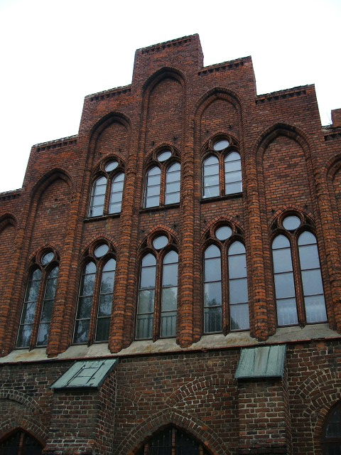 Stralsund.